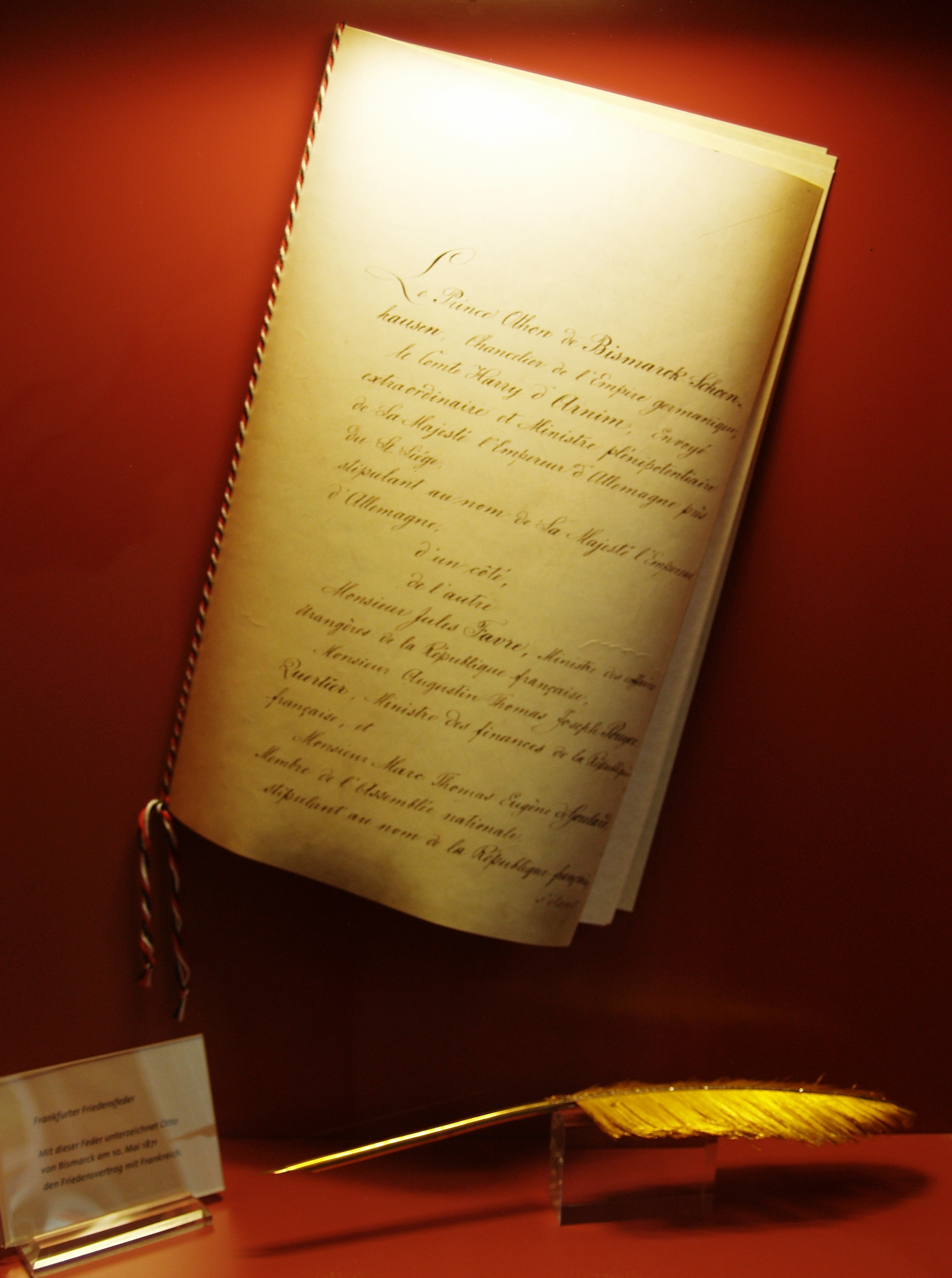 Der Vertrag und die Feder, mit der Bismarck den Vertrag unterschrieb